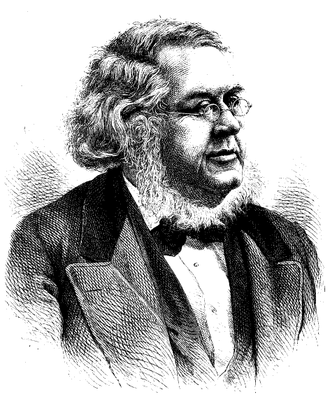 Peter Christen Asbjørnsen